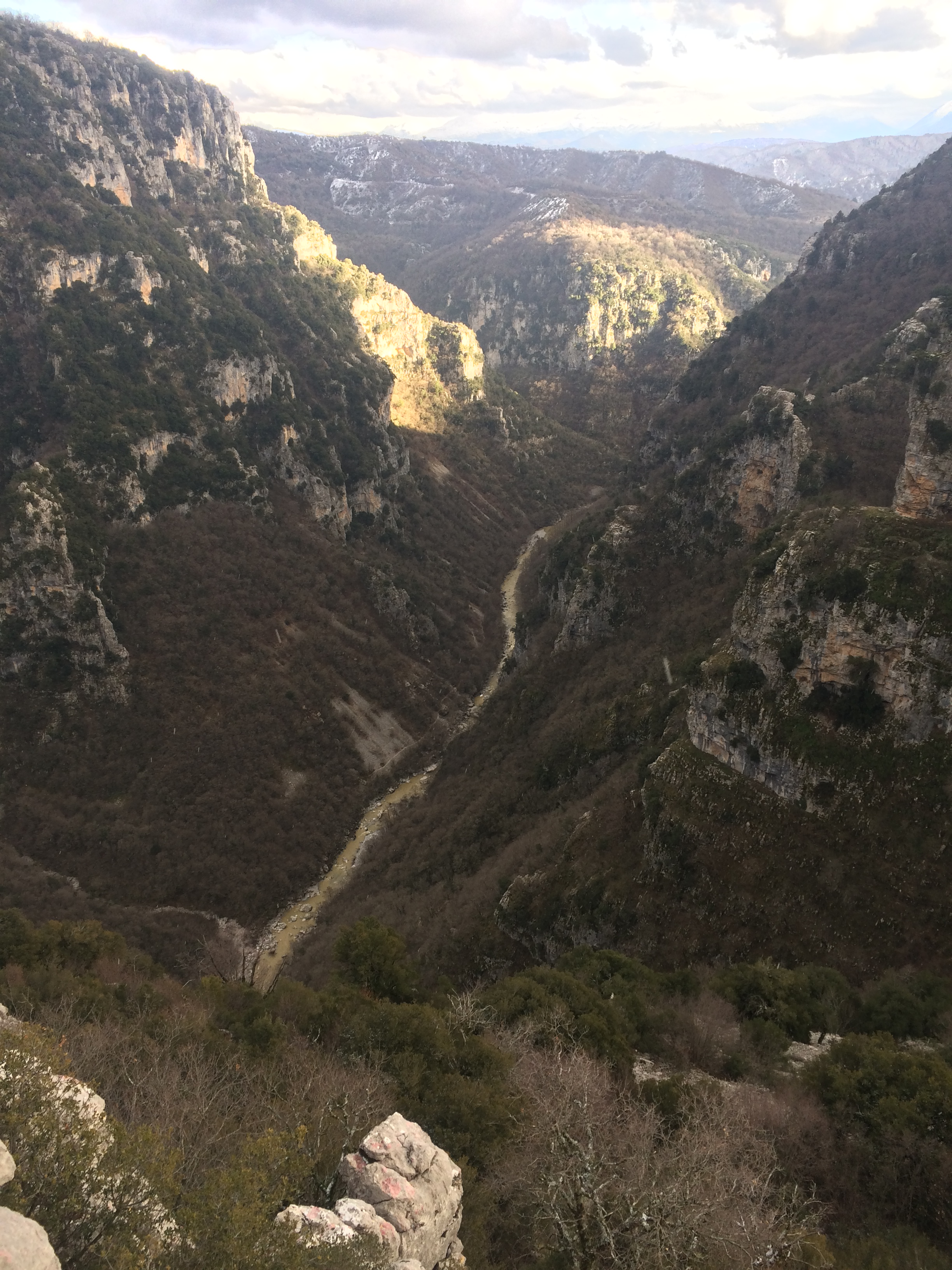 Φαράγγι Βίκου This is a photography of Natura 2000 protected area with ID GR2130004